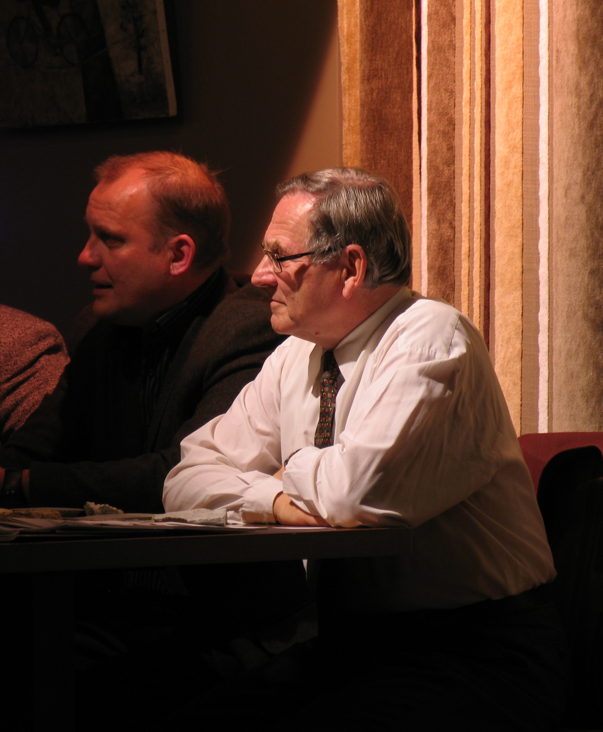 Esiplaanil Rein Einasto, taustal Alvar Soesoo.